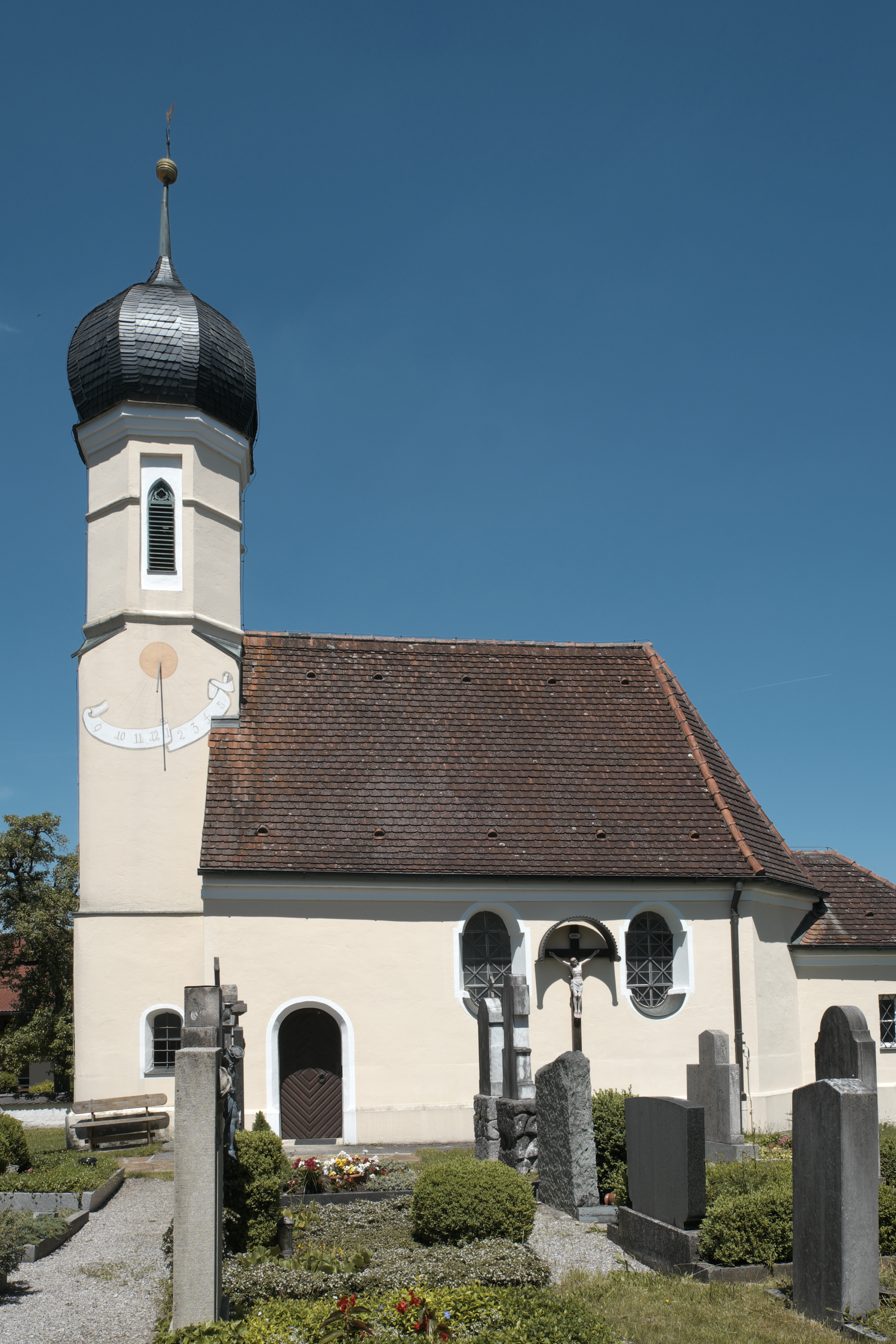 Kapelle St. Michael in Schlagenhofen (Inning am Ammersee) im Landkreis Starnberg (Bayern, Deutschland)